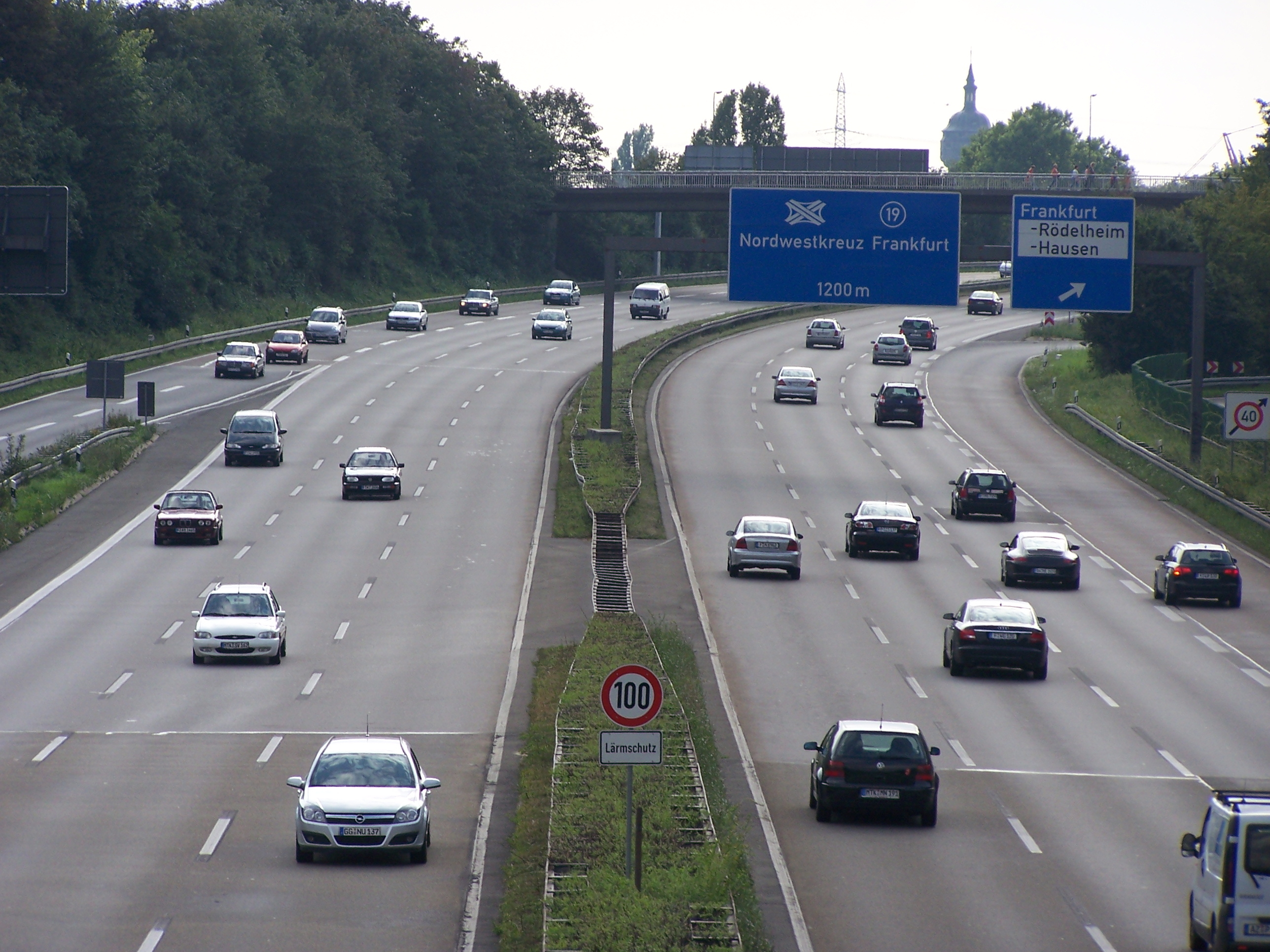 Bundesautobahn 66 an der Anschlussstelle Ludwig-Landmann-Straße